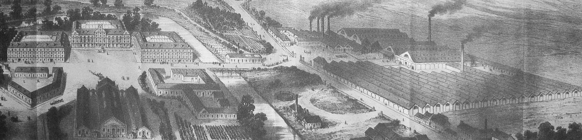 Vue d'ensemble du Familistère ou Palais social